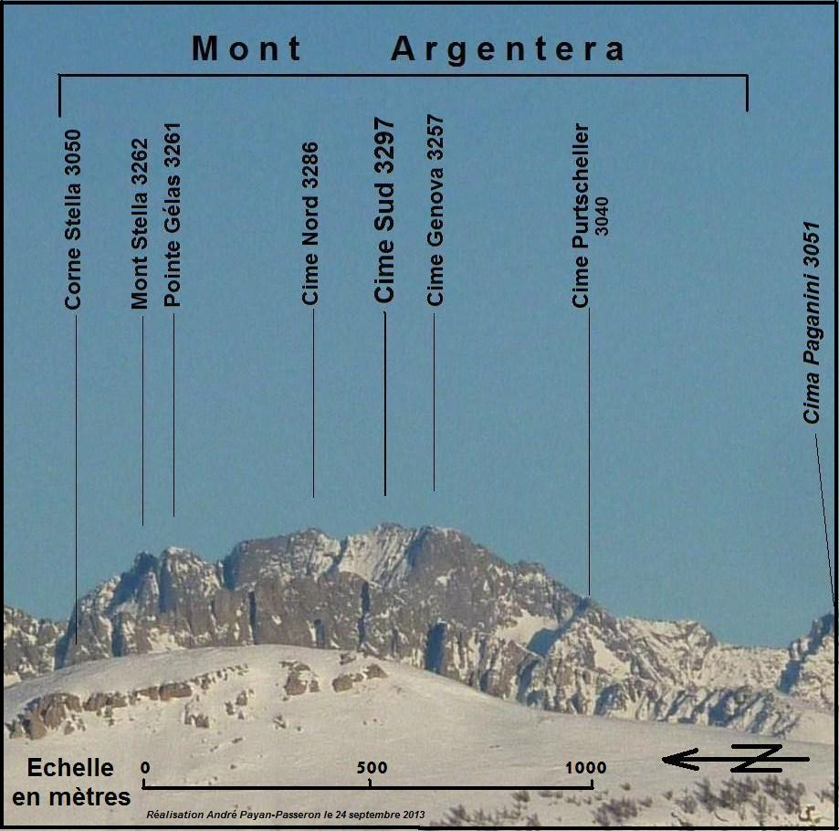 Le mont Argentera - culminant à sa cime Sud à 3297 mètres - constitue, en territoire italien, la ligne de crêtes (nord-sud) dominante du massif de l'Argentera. Photo prise au téléobjectif de l'ouest-sud-ouest vers l'est-nord-est (avec un angle de 11°) à 29 km de distance à partir de la tête de Charnaye (1972 m à 3°36 Est et 48°87 Nord) située à 2,7 km au N.E. de la station de Valberg (06-Alpes-Maritimes)